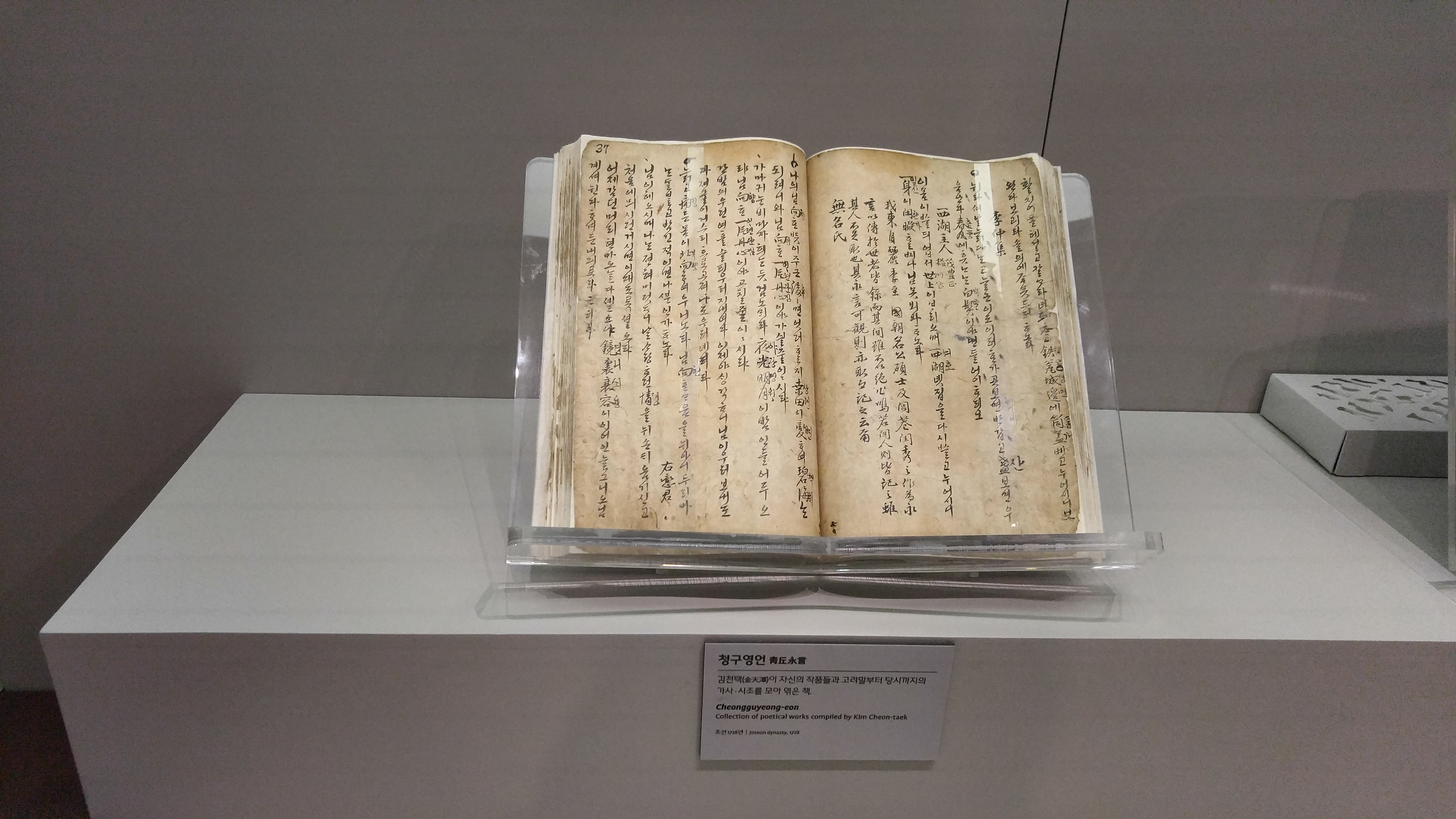 청구영언(1)